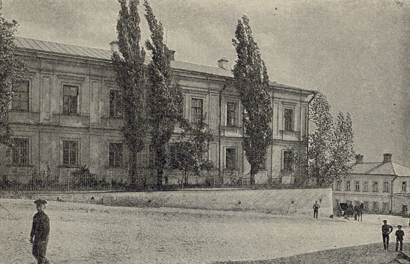 Воронежское духовное училище